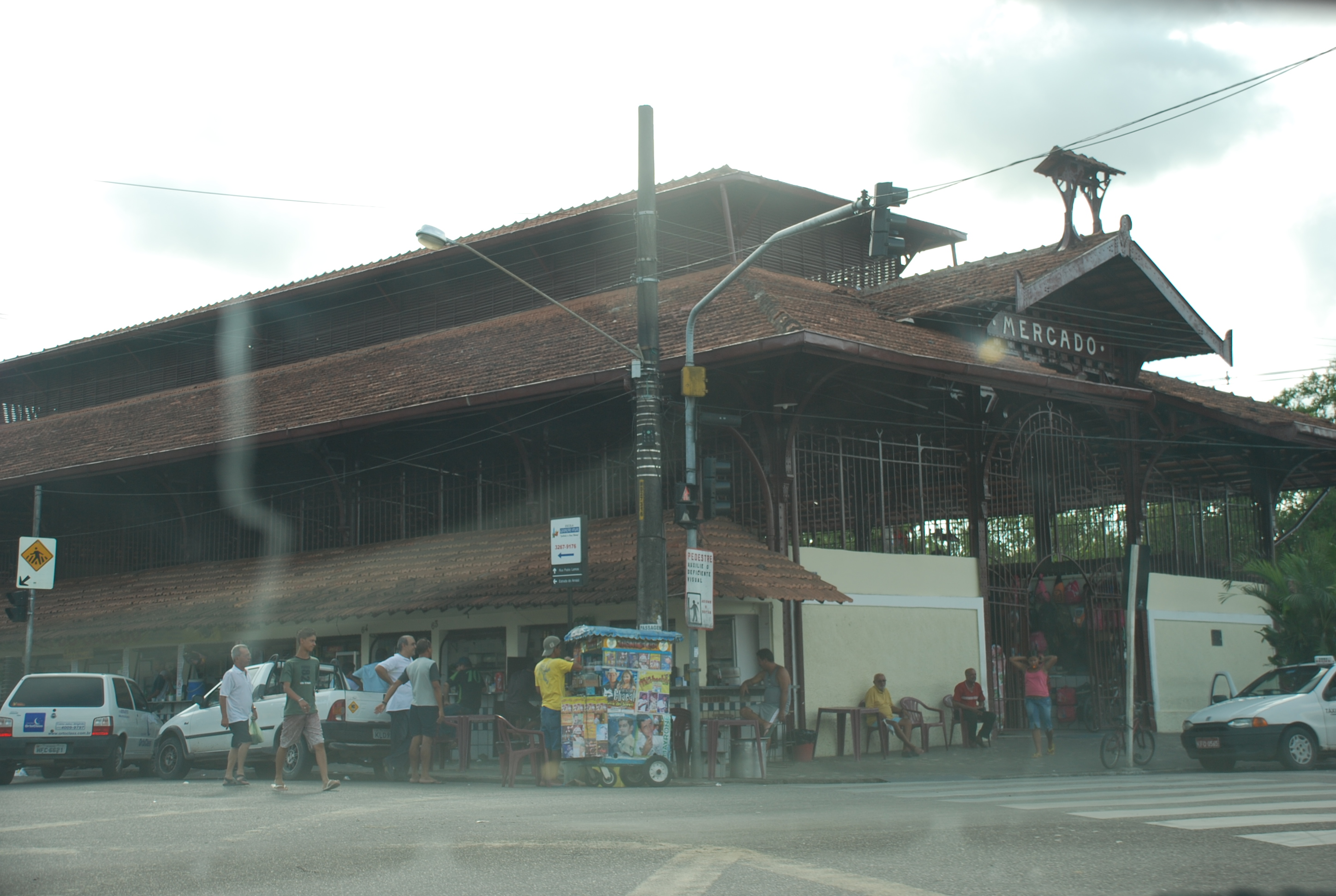 Mercado de Casa Amarela, situado no bairro de Casa Amarela, Recife, Pernambuco, Brasil